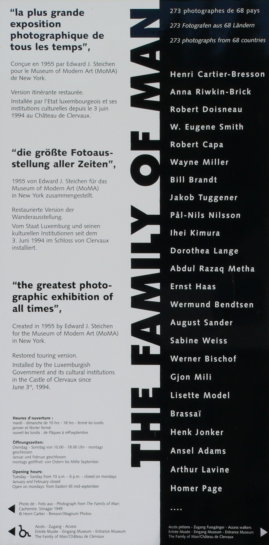 Schild der Foto-Ausstellung "The Family Of Man" in Clerf (fr.: Clervaux) Luxemburg